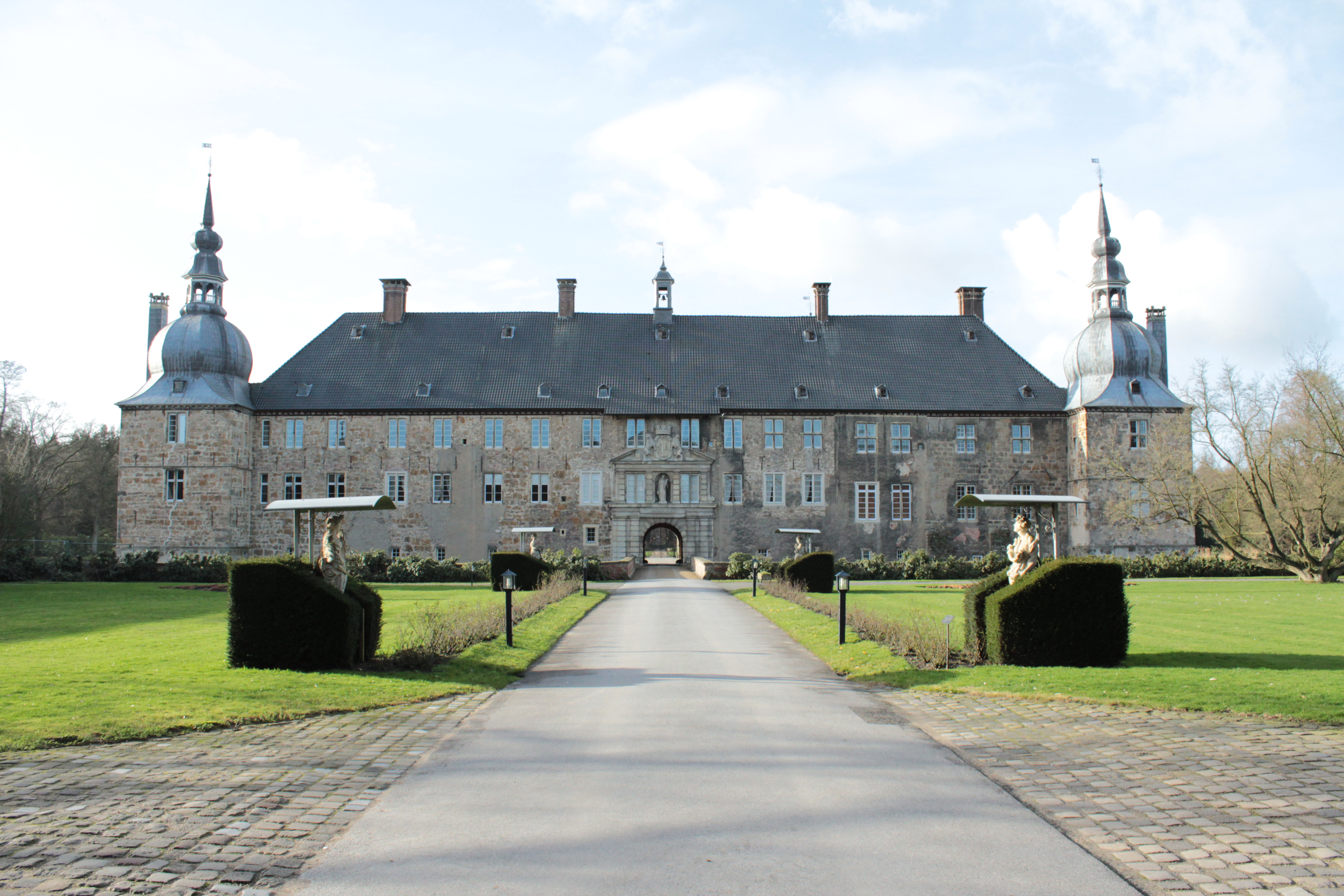 Schloß Lembeck This is a photograph of an architectural monument.